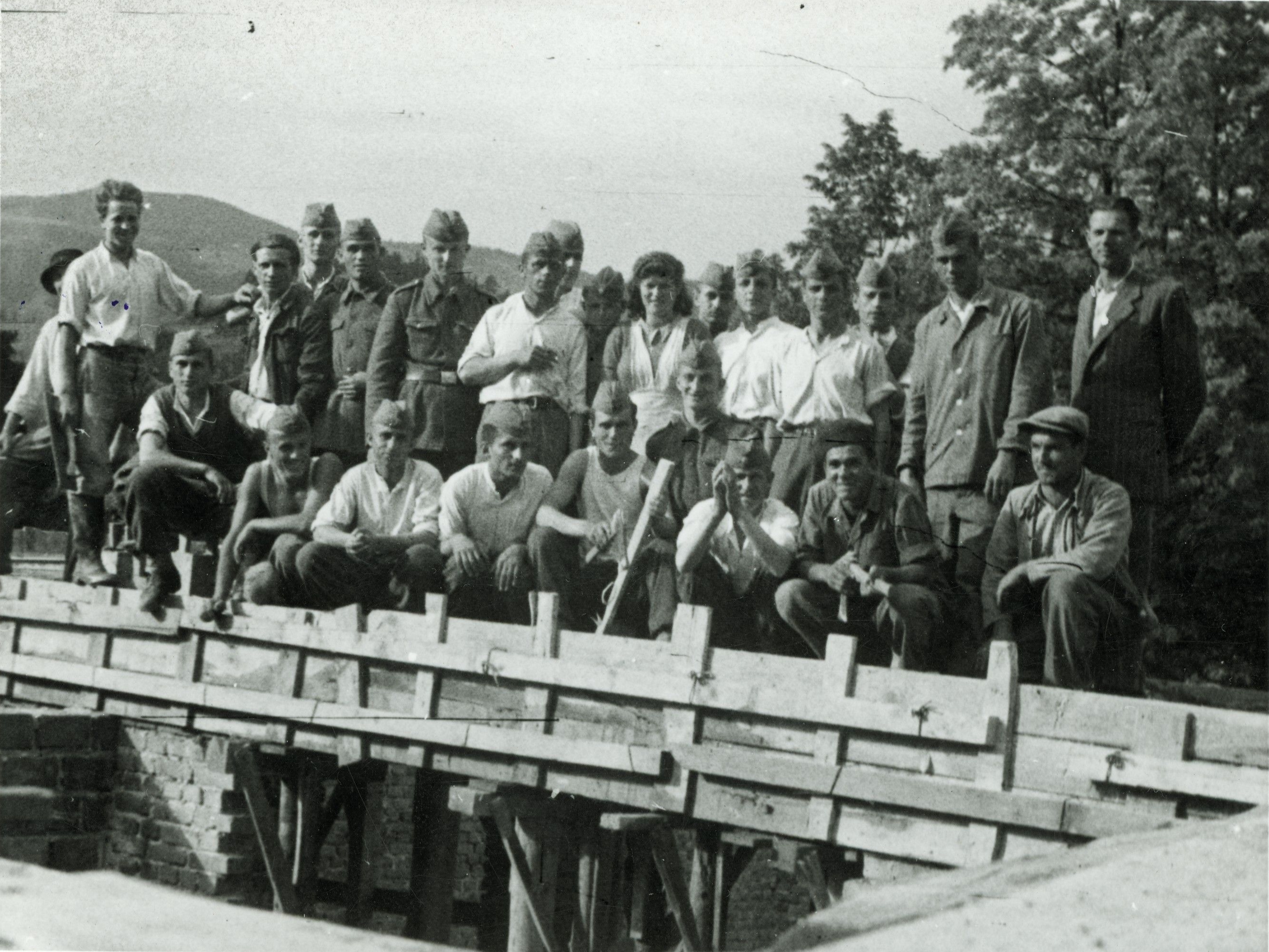 Gradnja gimnazije na Ravnah - KNOJ-evci so prišli pomagat.